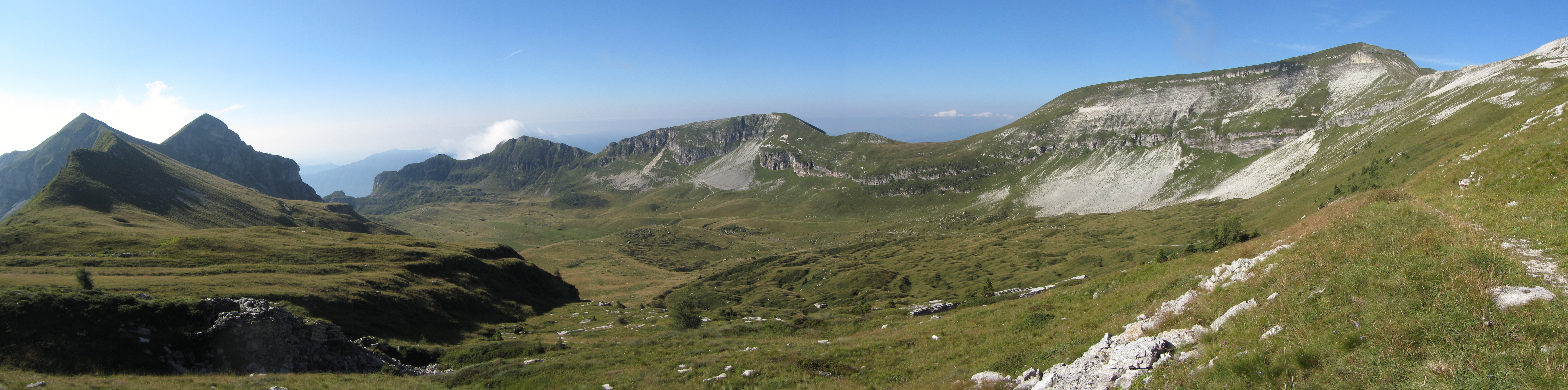 Busa delle Vette Feltrine - Parco Nazionale delle Dolomiti Bellunesi